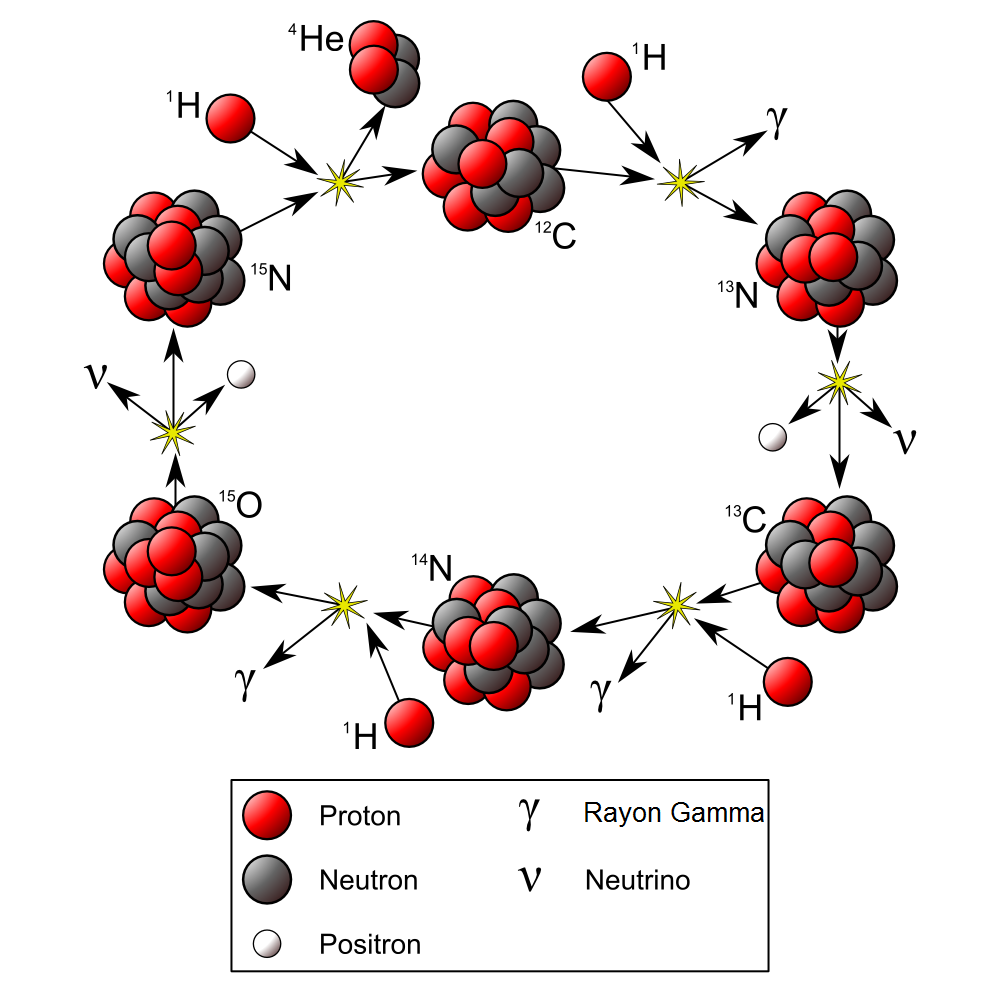 Cycle Carbone-Azote-Oxygène